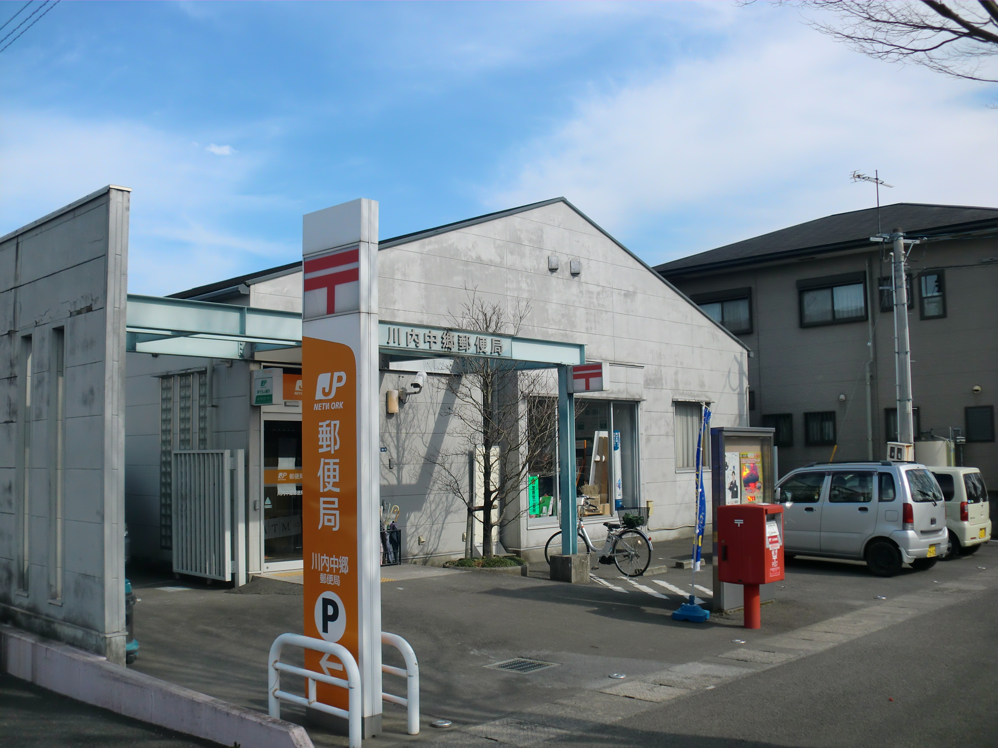 薩摩川内市にある川内中郷（せんだいなかごう）郵便局